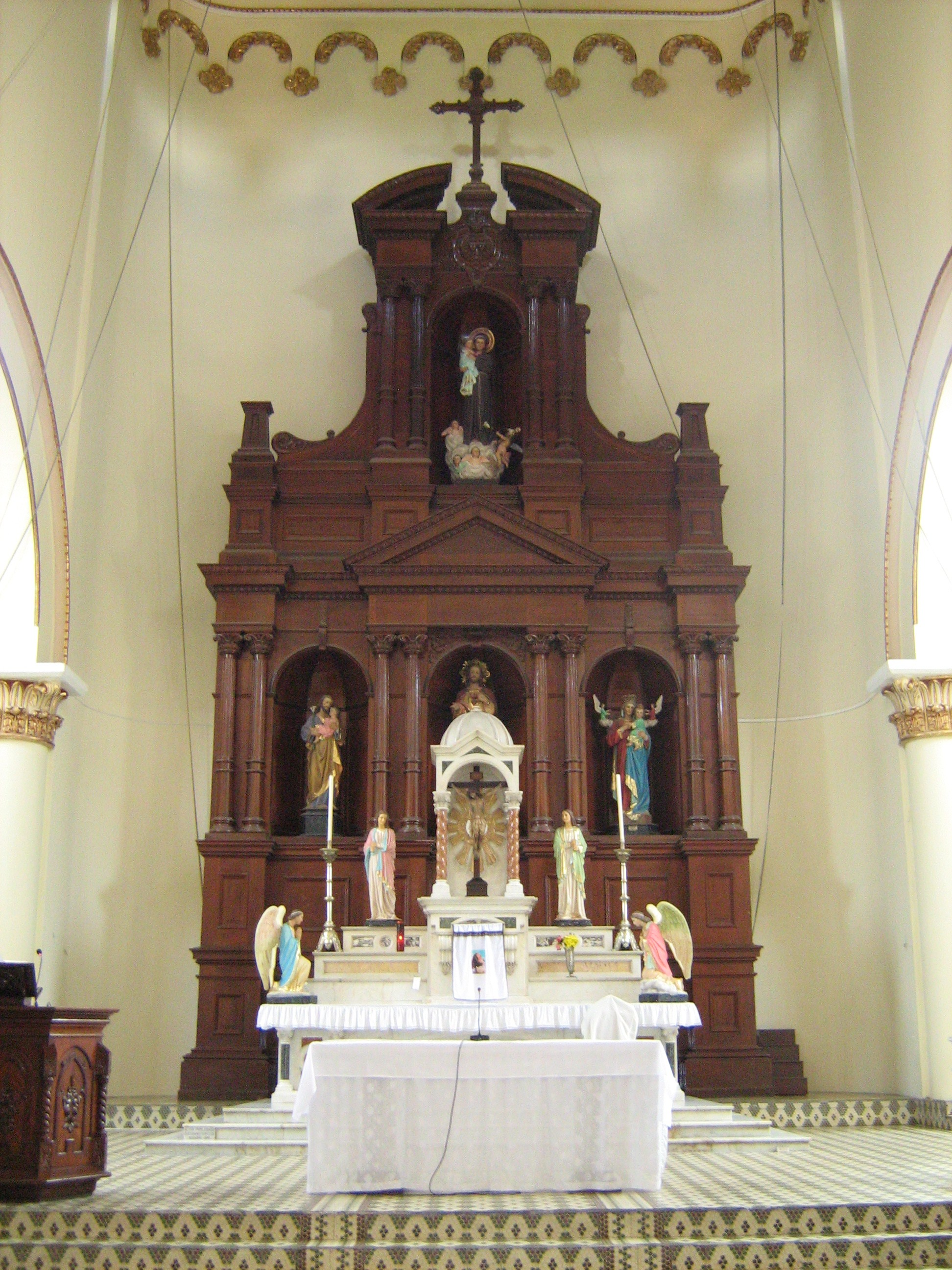 Iglesia de San Antonio de Padua en el municipio de Barbosa, Antioquia, Colombia.